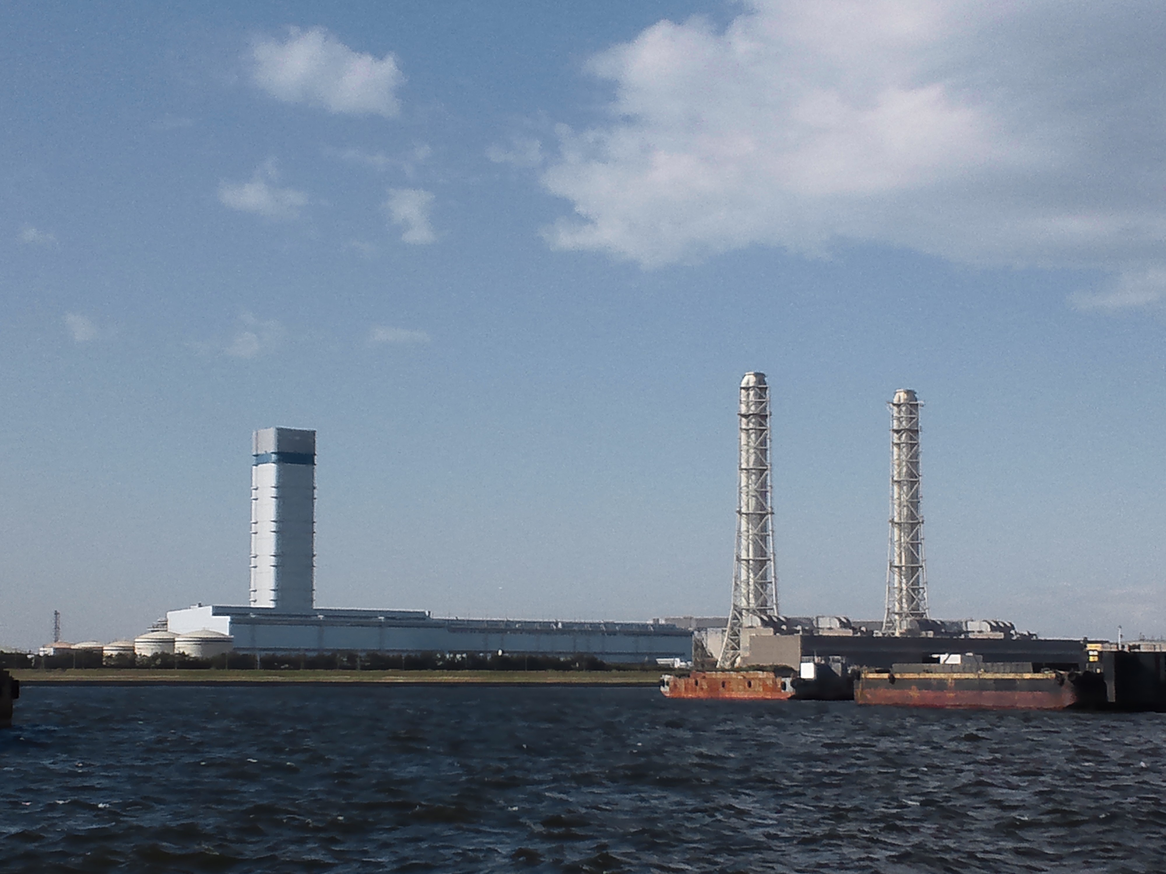 東京電力富津火力発電所